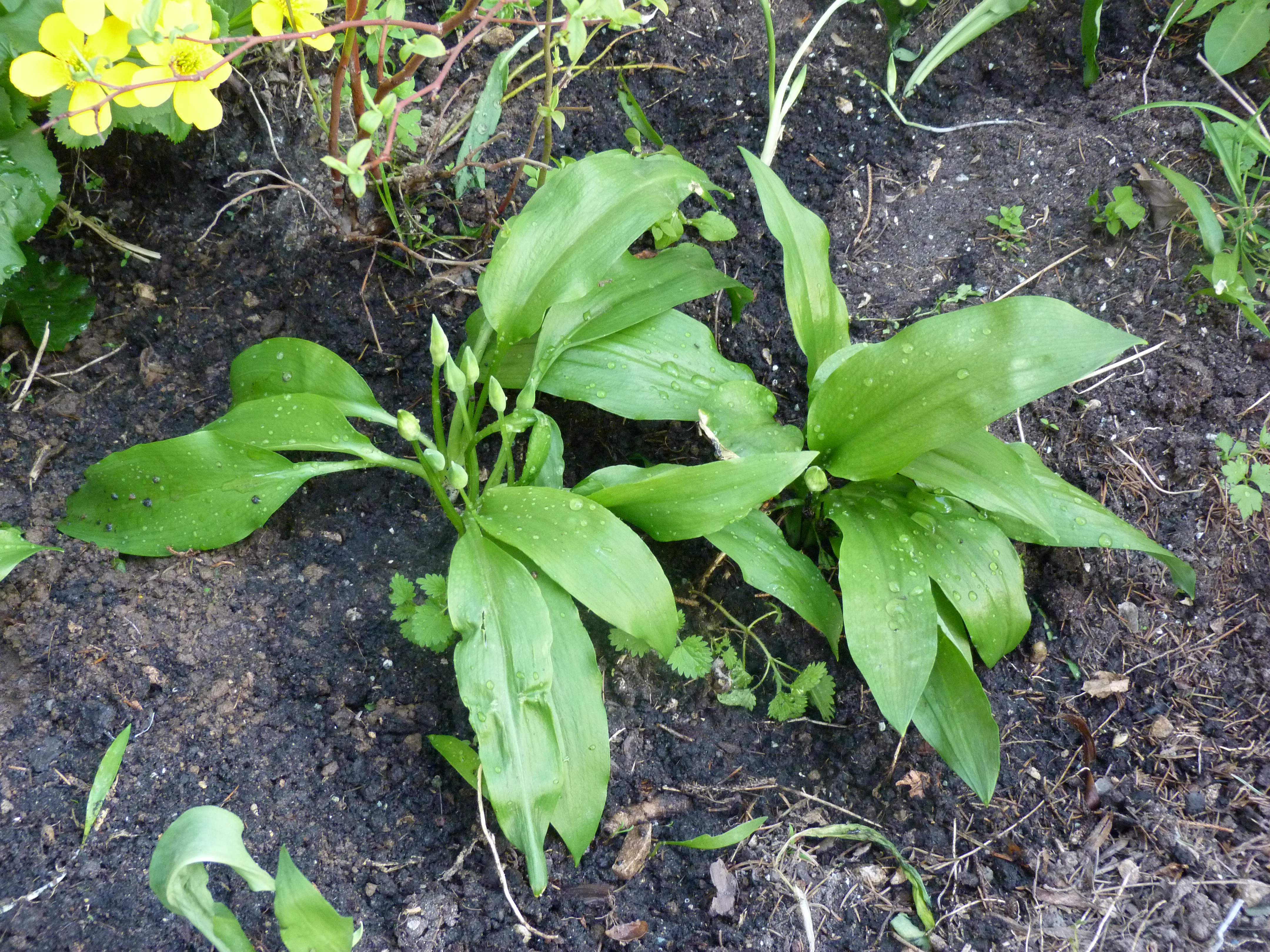 A felvétel 2013. április 23-án készült Budán. A sashegyi természetvédelmi területhez közeli kert. ©© Derzsi Elekes Andor, Budapest, 2015, Published in the Metapolisz DVD line. You are authorised to use this photo under Creative Commons – even for commercial, for profit purposes. The vid must be attributed to Derzsi Elekes Andor. All of the photos and vids in the Metapolisz DVD line are under Creative Commons and can be used even for commercial – for profit – purposes. Recommended Citation Derzsi Elekes Andor: Metapolisz DVD line